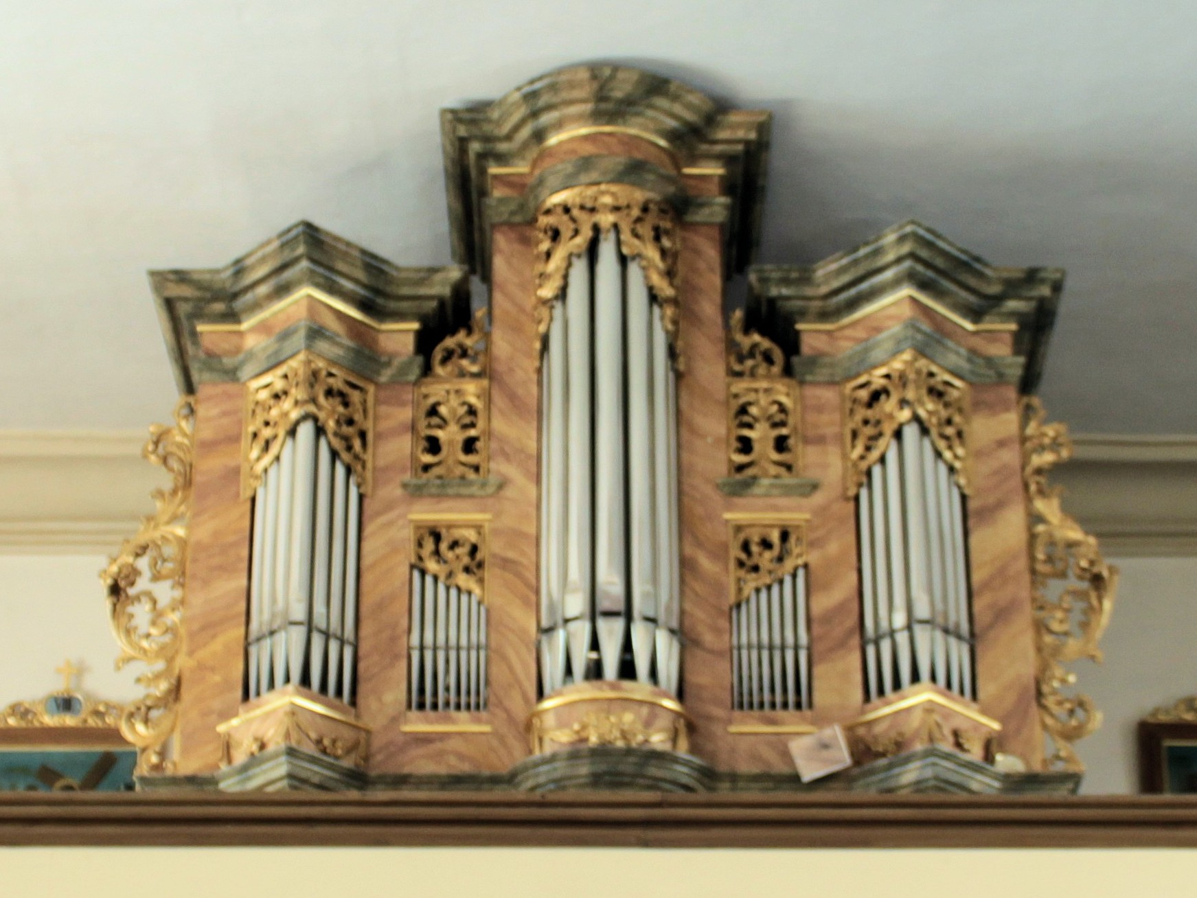 Orgel der Pfarrkirche Mariä Himmelfahrt in Walting, Markt Pleinfeld